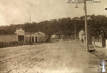 Antiga fotografia com as primeiras casas do Velho Brejo - atual Belford Roxo.